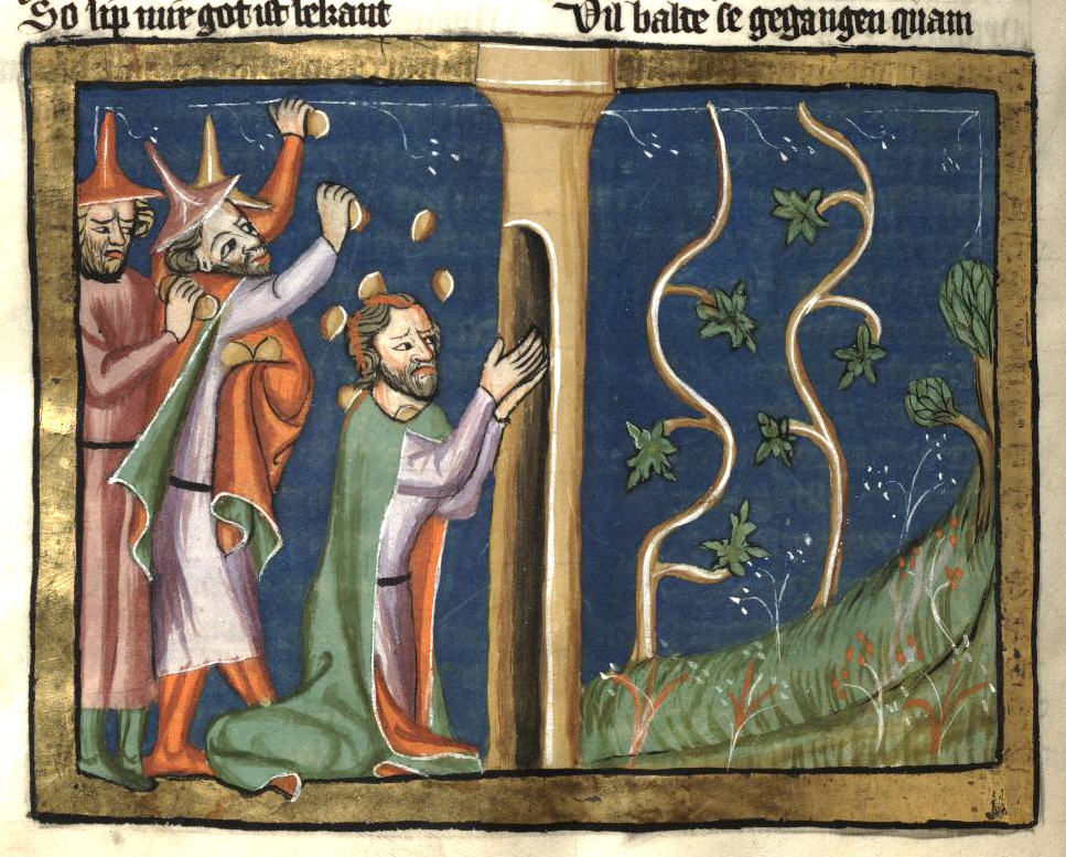 Rudolf von Ems: Weltchronik. Böhmen (Prag), 3. Viertel 14. Jahrhundert. Hochschul- und Landesbibliothek Fulda, Aa 88. Bildbeschreibung nach Martin Roland. Miniatur 201 335v Nabots Steinigung vor dem Weinberg